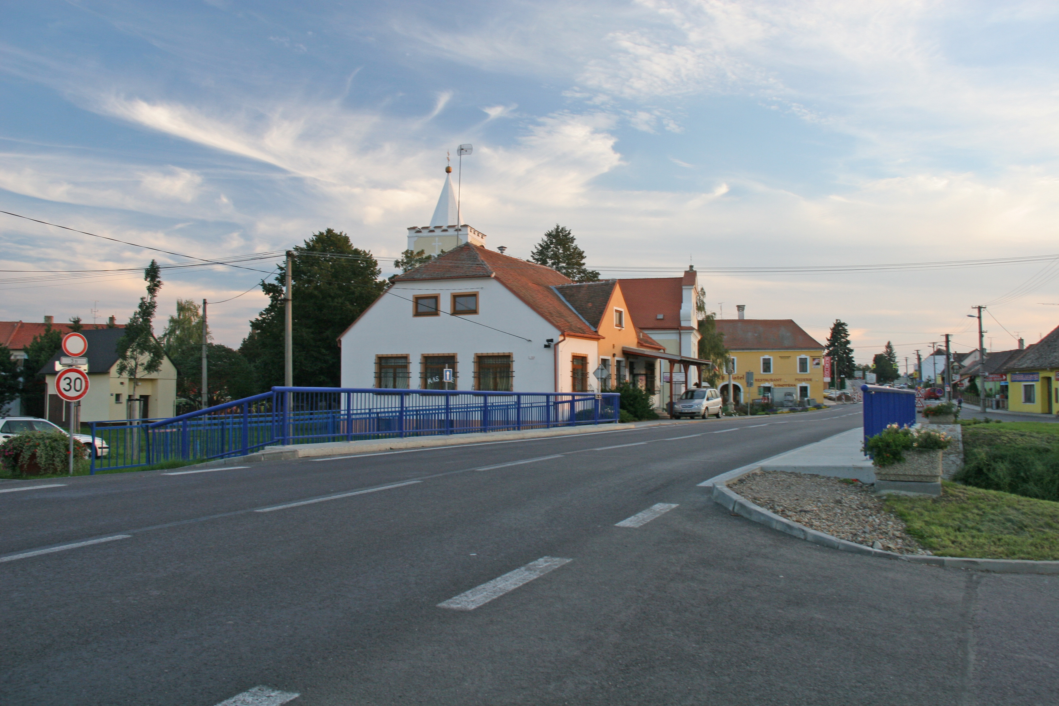 Chvalovice čp. 80